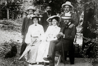 Hermann Bahr und Felix Salten bei Redlichs in Altaussee. Österreich. Photographie. Juli 1903. 6 Personen von links (bestimmt nach Analogien in anderen bei Commons vorhandenen Fotos): 1. Josef Redlich 2. Frau 6. Hermann Bahr 3. Herr 4. Frau 5. Felix Salten 6. Herr